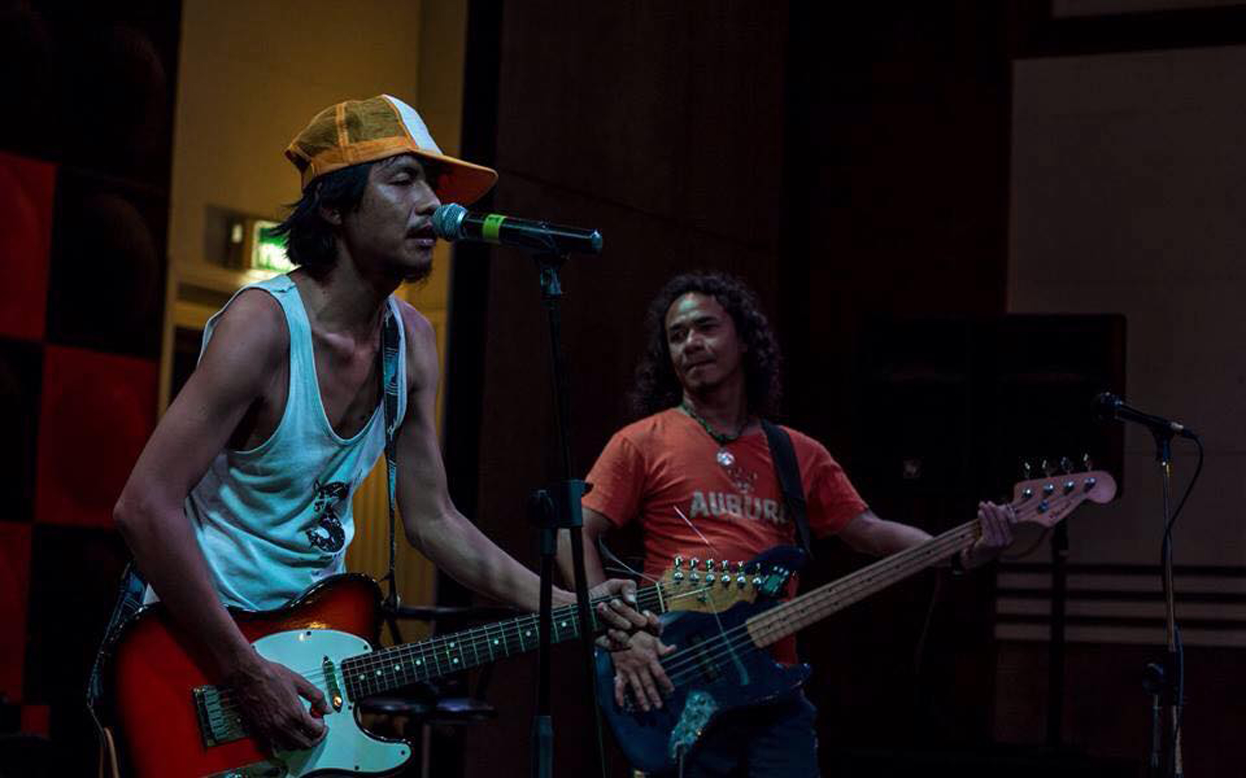 รอย กับ แกะ ในงาน Dogs